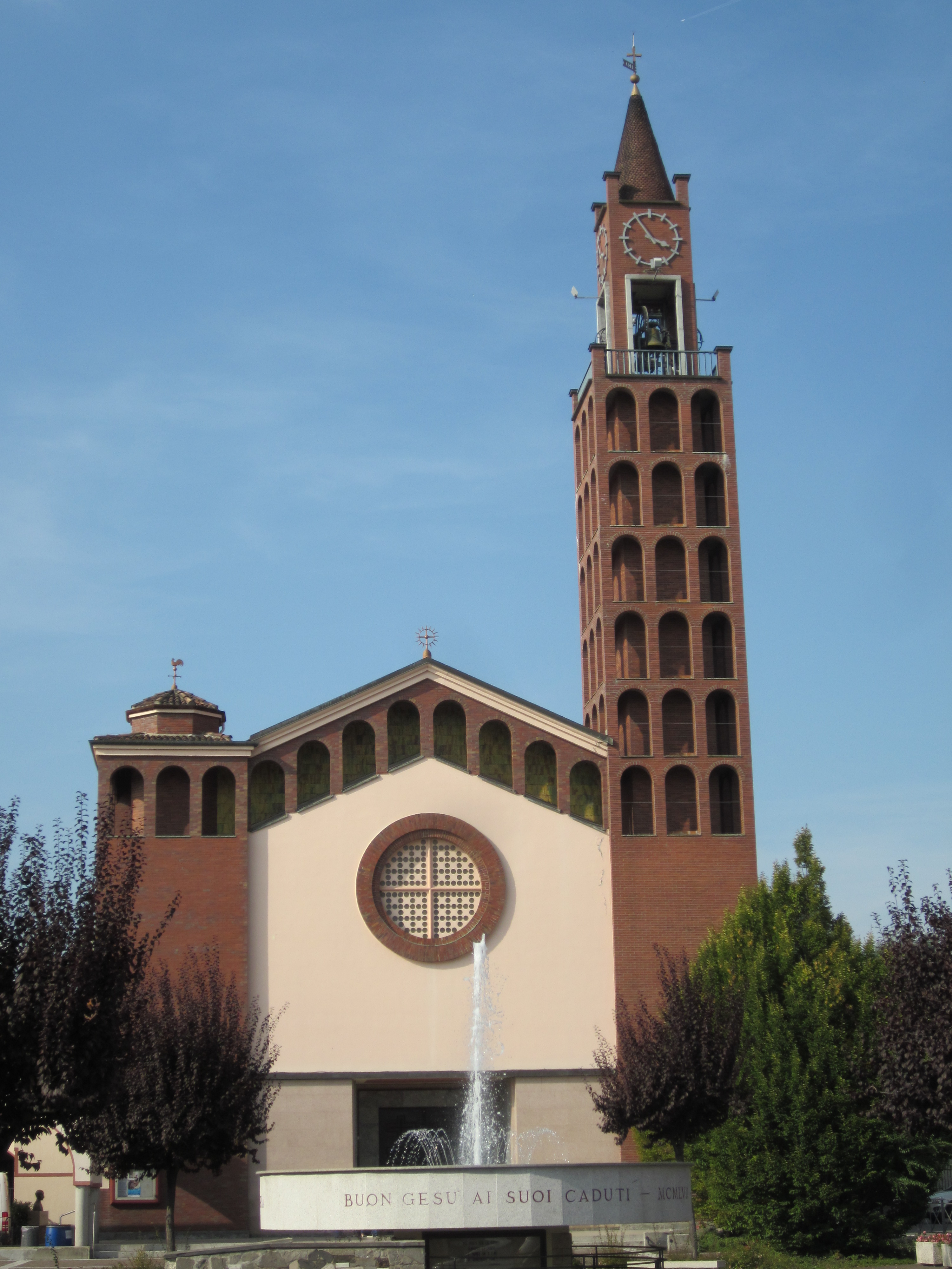 Chiesa di San Giuseppe in Buon Gesù This is a photo of a monument which is part of cultural heritage of Italy.